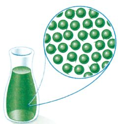 Հեղուկ նյութը և նրա մասնիկները